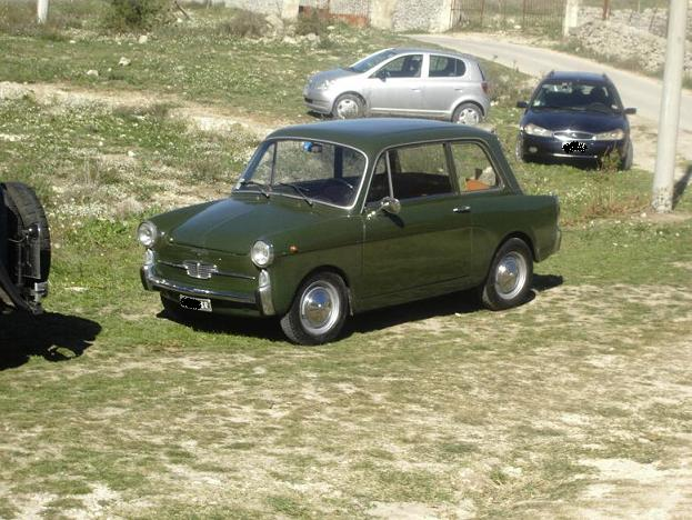 Autobianchi Bianchina Berlina del 1967